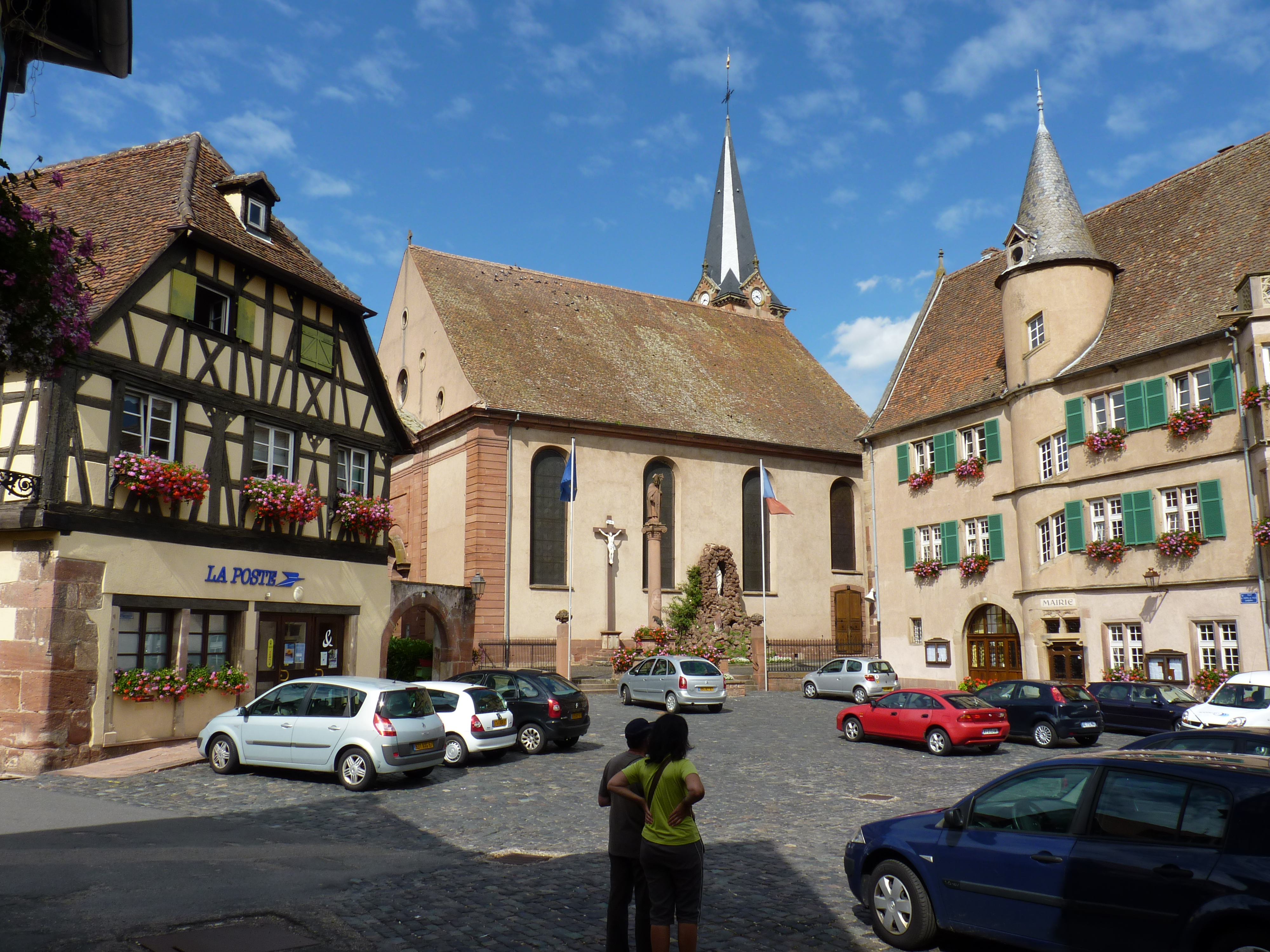 La poste, l'église et l'hôtel de ville depuis sur la place centrale